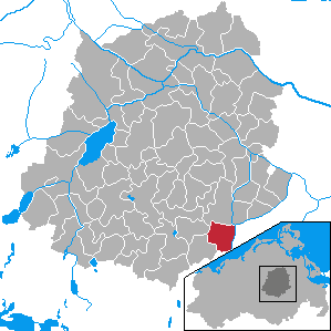 Groß Teetzleben, Landkreis Demmin, Mecklenburg-Vorpommern